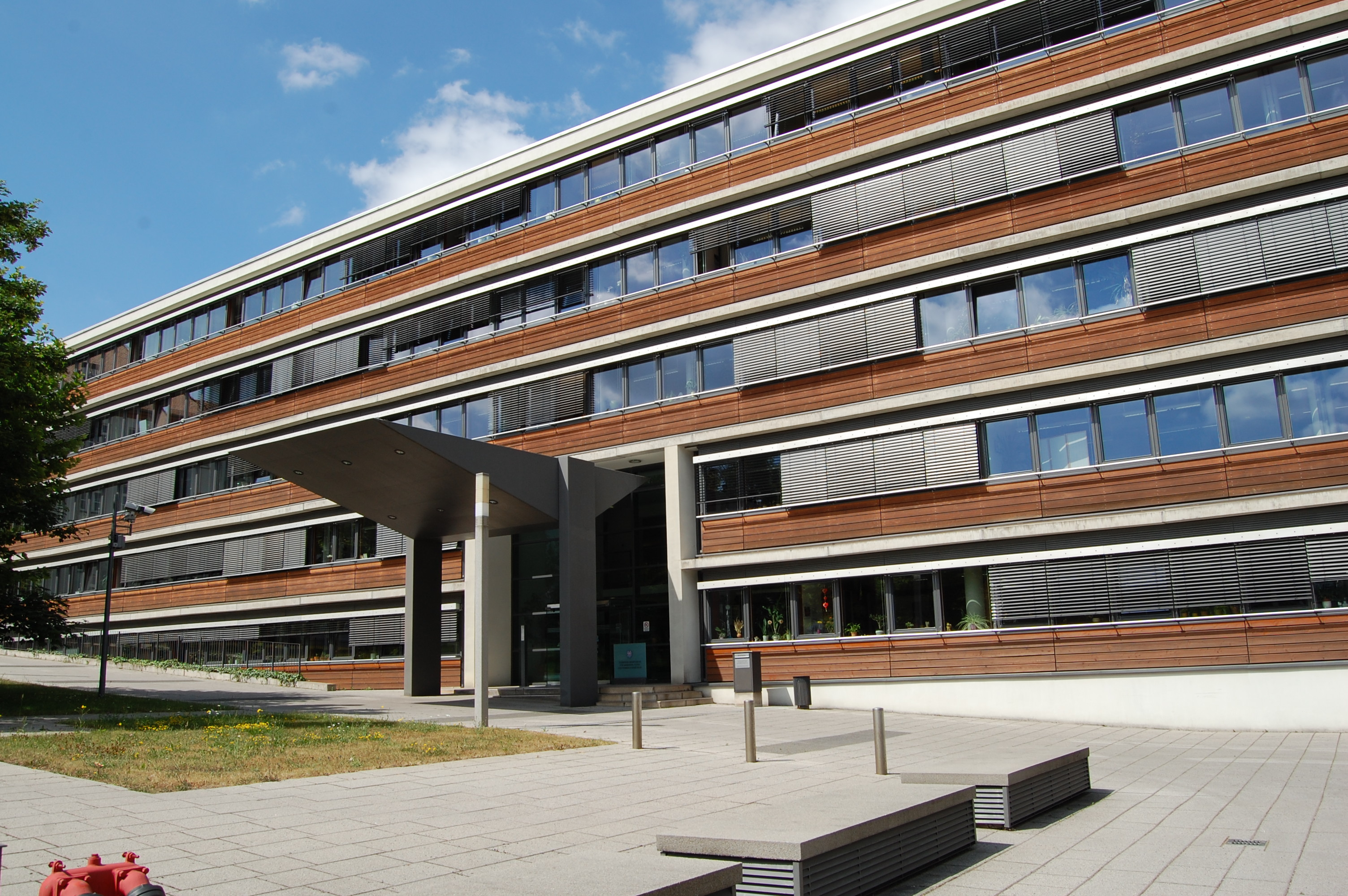 Front mit Haupteingang des Thüringer Ministeriums für Migration, Justiz und Verbraucherschutz (TMMJV) in Erfurt